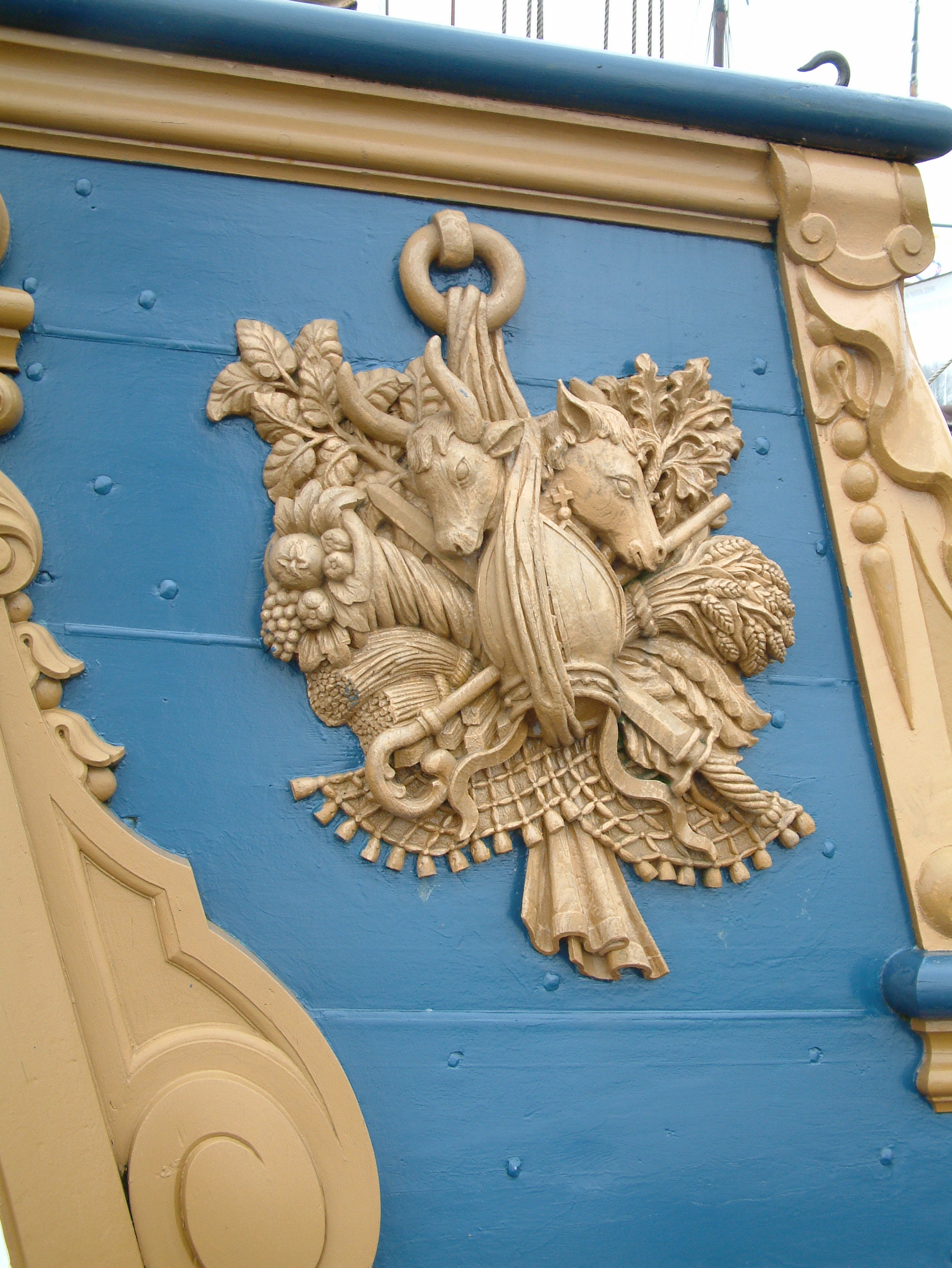 Het statenjacht UTRECHT voor de wal bij de klassieke schepenbeurs in Enkhuizen.